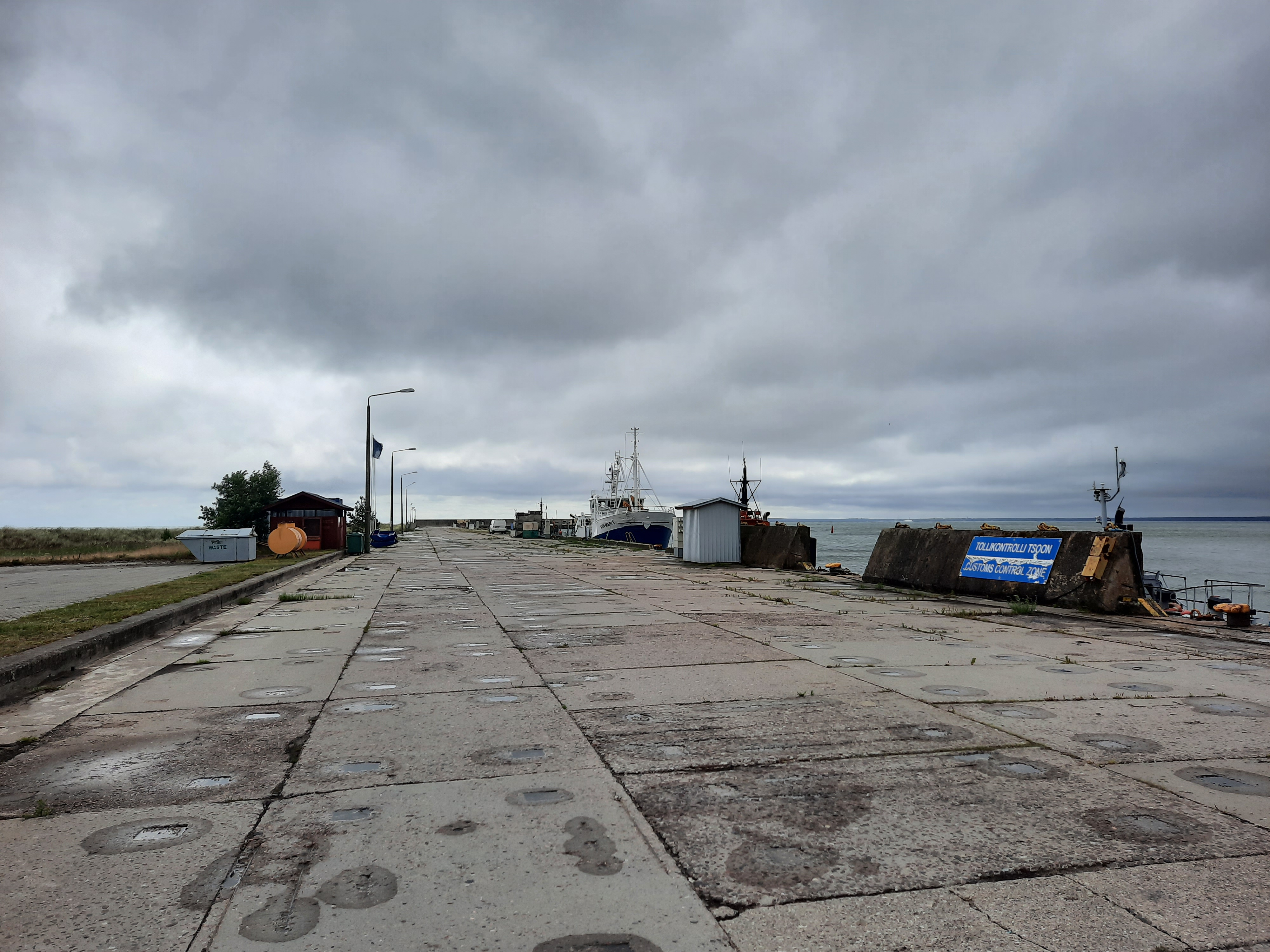 Lehtma sadama kaid, Hiiumaal